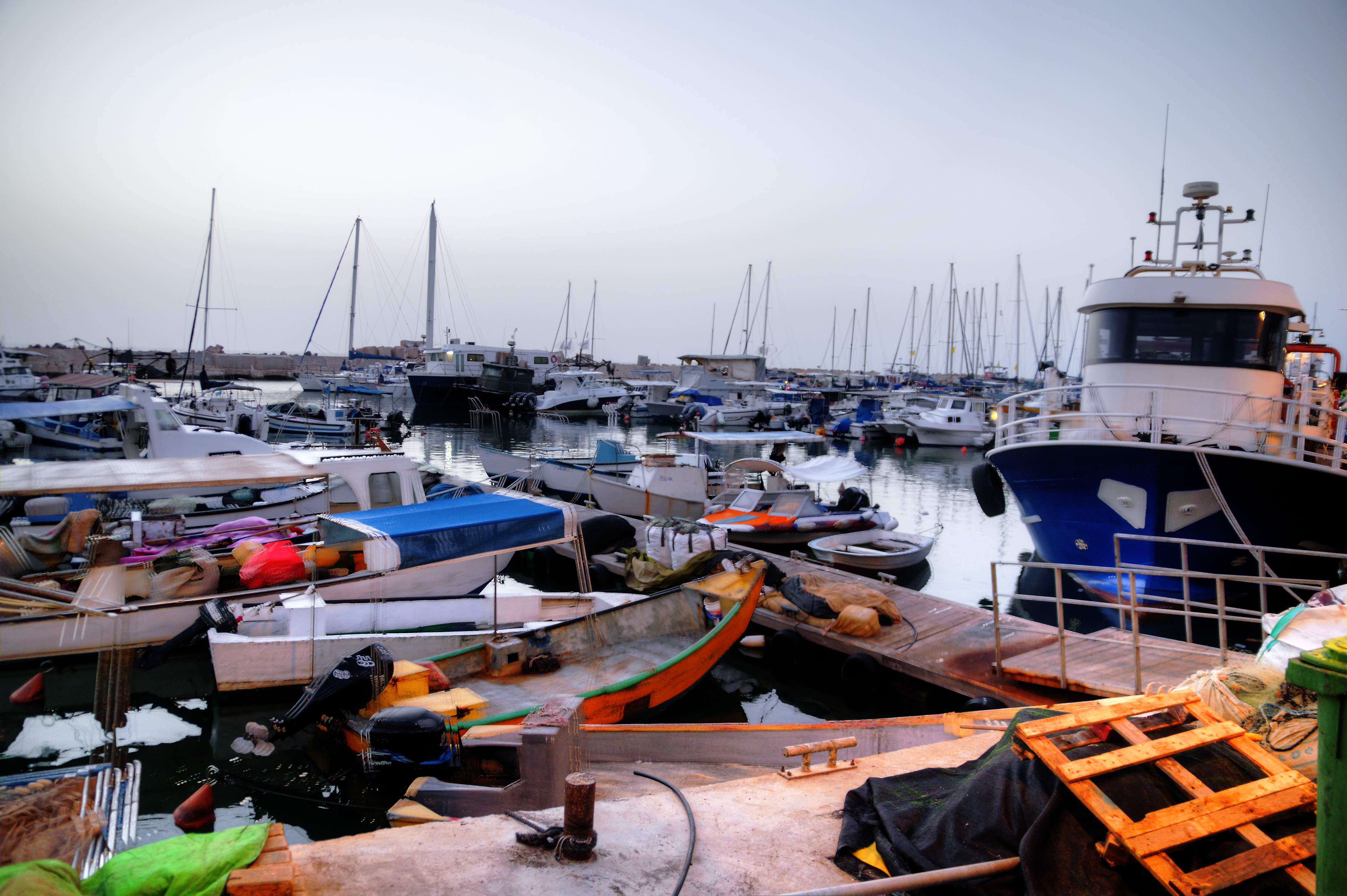 נמל יפו הוא נמל בחופה של יפו, ונחשב לאחד הנמלים העתיקים בעולם. נמל יפו היה הנמל הראשי של ארץ ישראל עד לאמצע תקופת המנדט הבריטי.